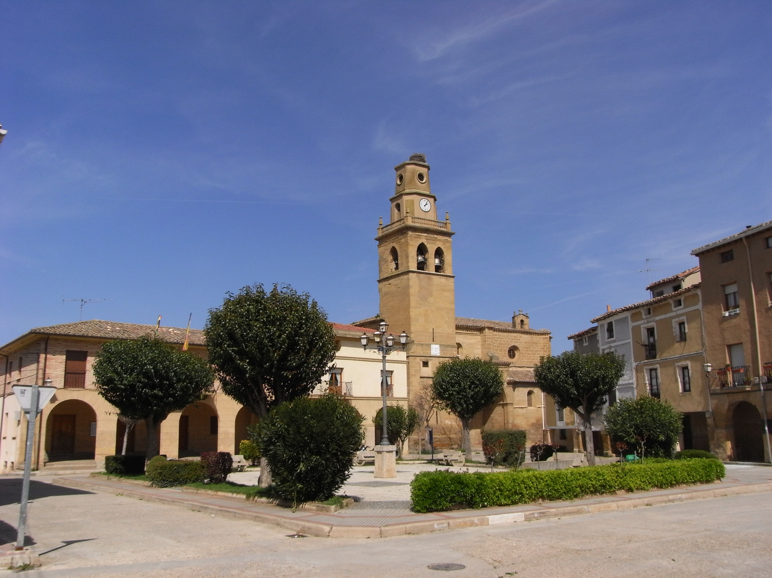 Iglesia de San Martin y Plaza de la Constitución de Anguciana, La Rioja (España)